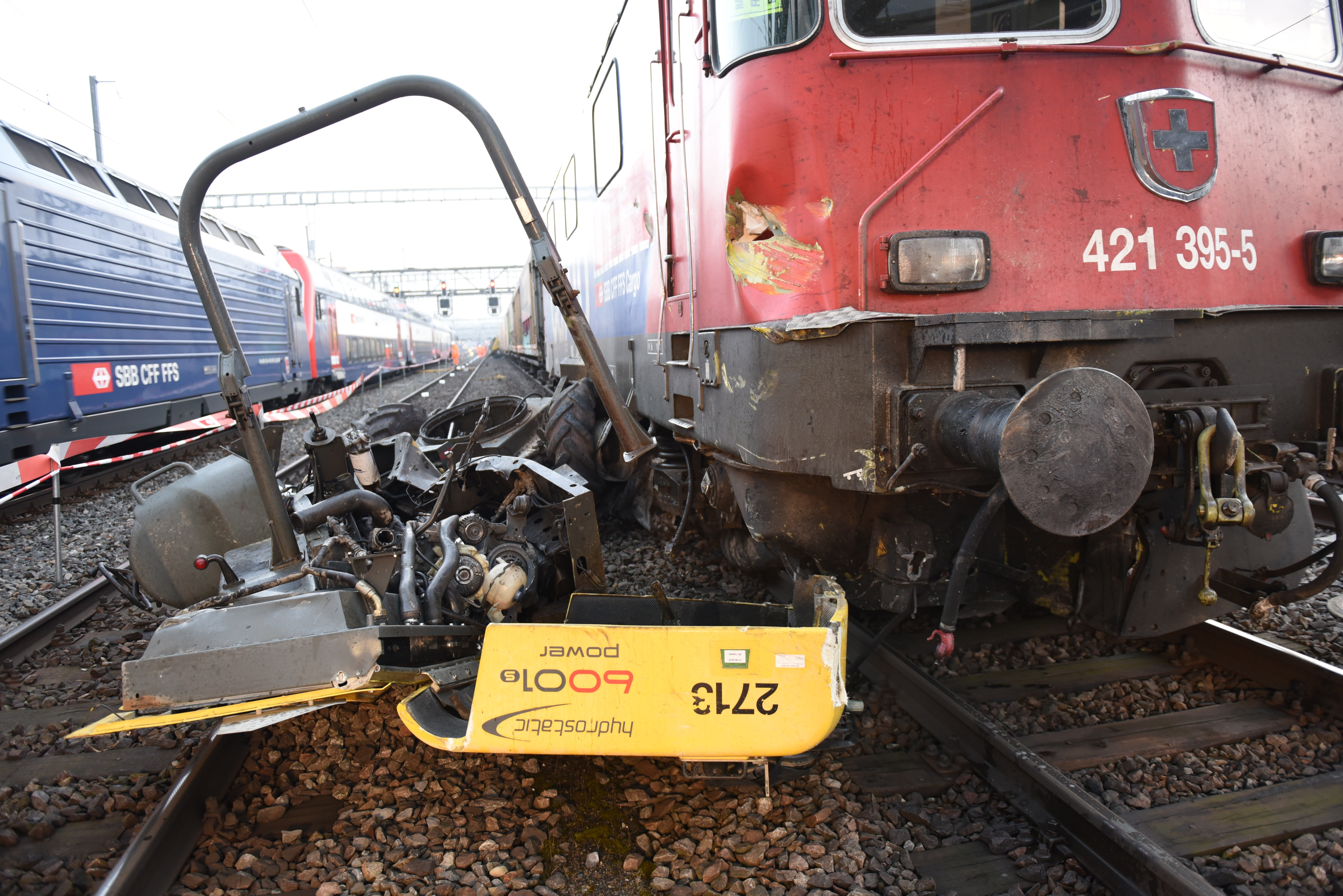 Am 7. Februar 2017 kollidierte im Bahnhof Winterthur ein Güterzug mit einem Dumper, der beim Entsorgen von Betonabbruch auf das Gleise gelangt war. Der Fahrer des Baustellenfahrzeugs verstarb noch auf der Unfallstelle.